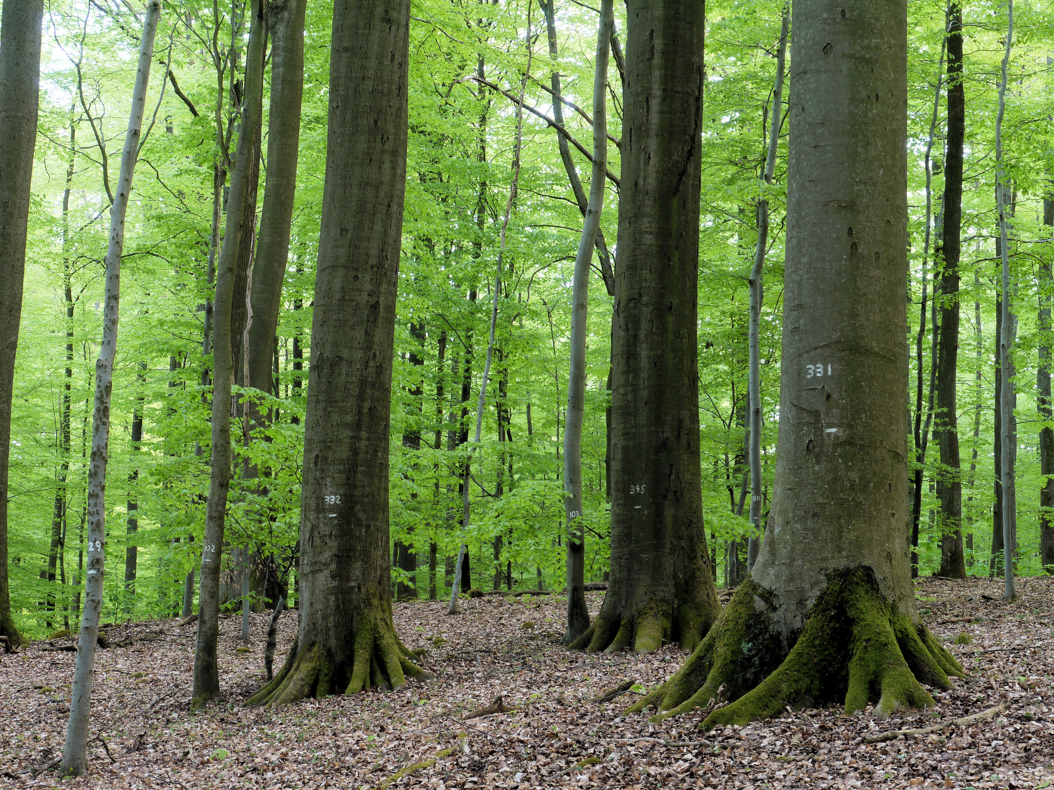 Naturwaldreservat Kleinengelein (Unterfranken): Der über Jahrzehnte als forstliches Anschauungsobjekt gepflegte Buchenaltbestand steht seit 2010 als Naturwaldreservat unter Naturschutz und wird daher nicht mehr bewirtschaftet.